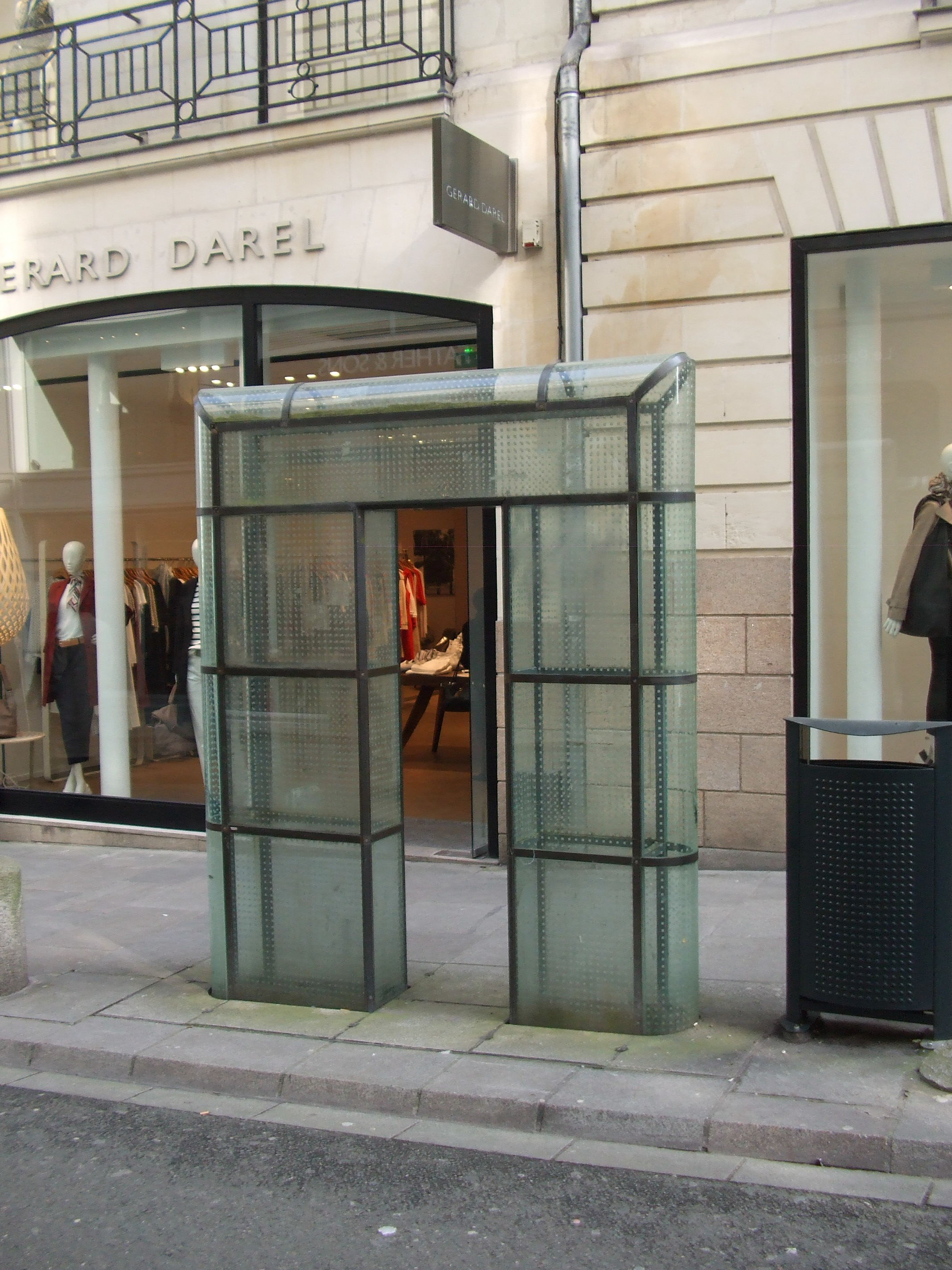 Rue Crébillon (Nantes)